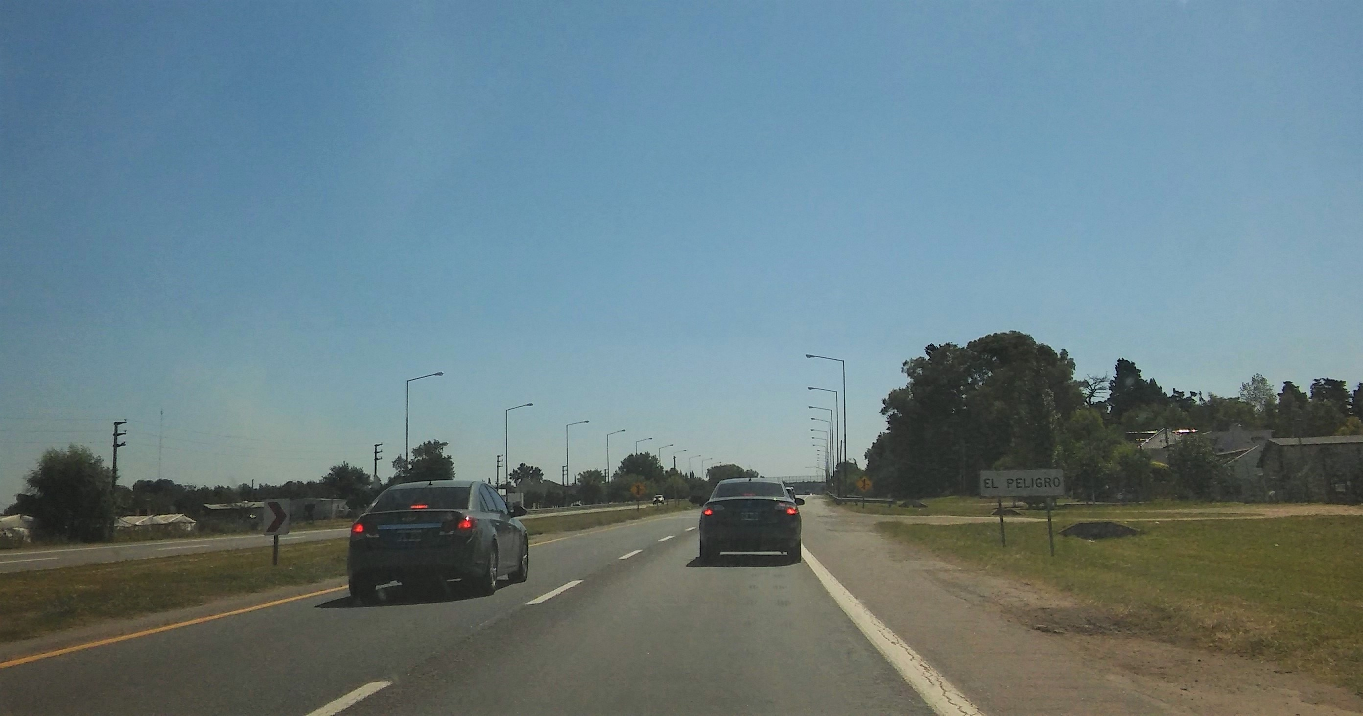 Ruta Provincial 2 a la altura de El Peligro, partido de La Plata.